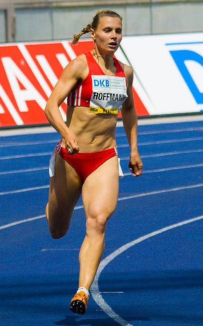 Estie Wittstock, Claudia Hoffmann